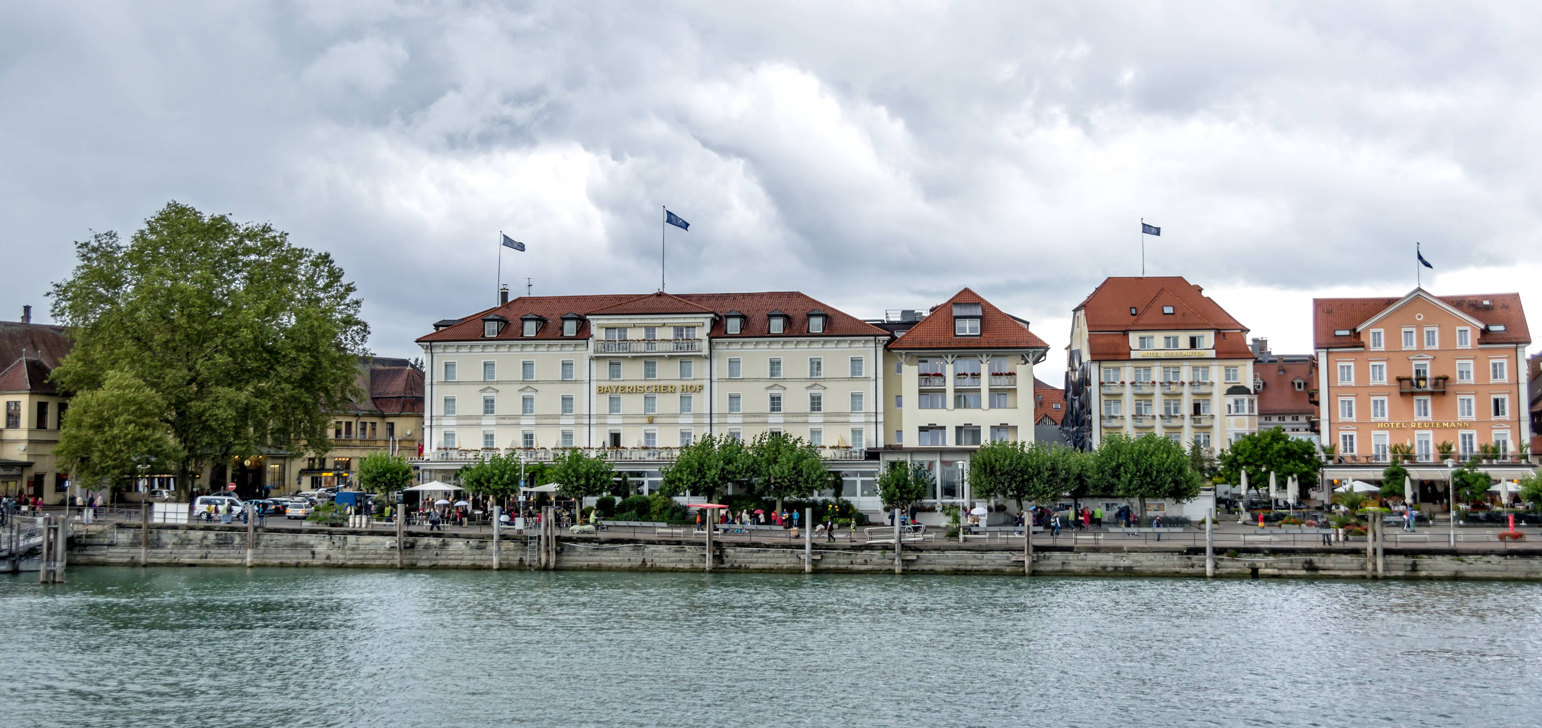 Bilder aus Lindau am Bodensee